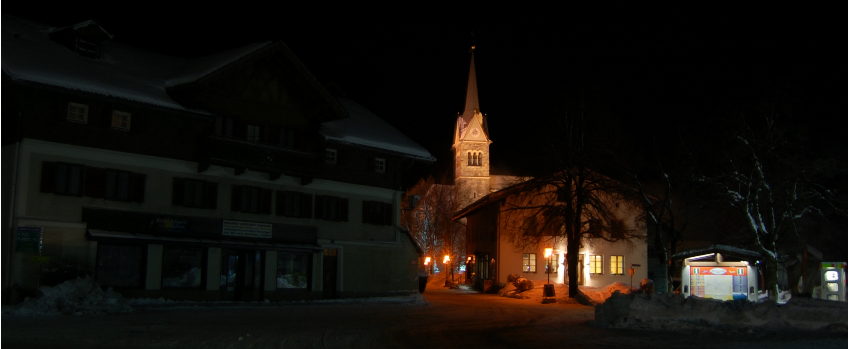 Ortskern von Niedernsill bei NachtCenter of Niedernsill at night